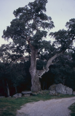 Suro del Mas Perxés, Agullana, Catalunya This is a a photo of a protected or outstanding tree in Catalonia, Spain, with id: MA-02.001.01